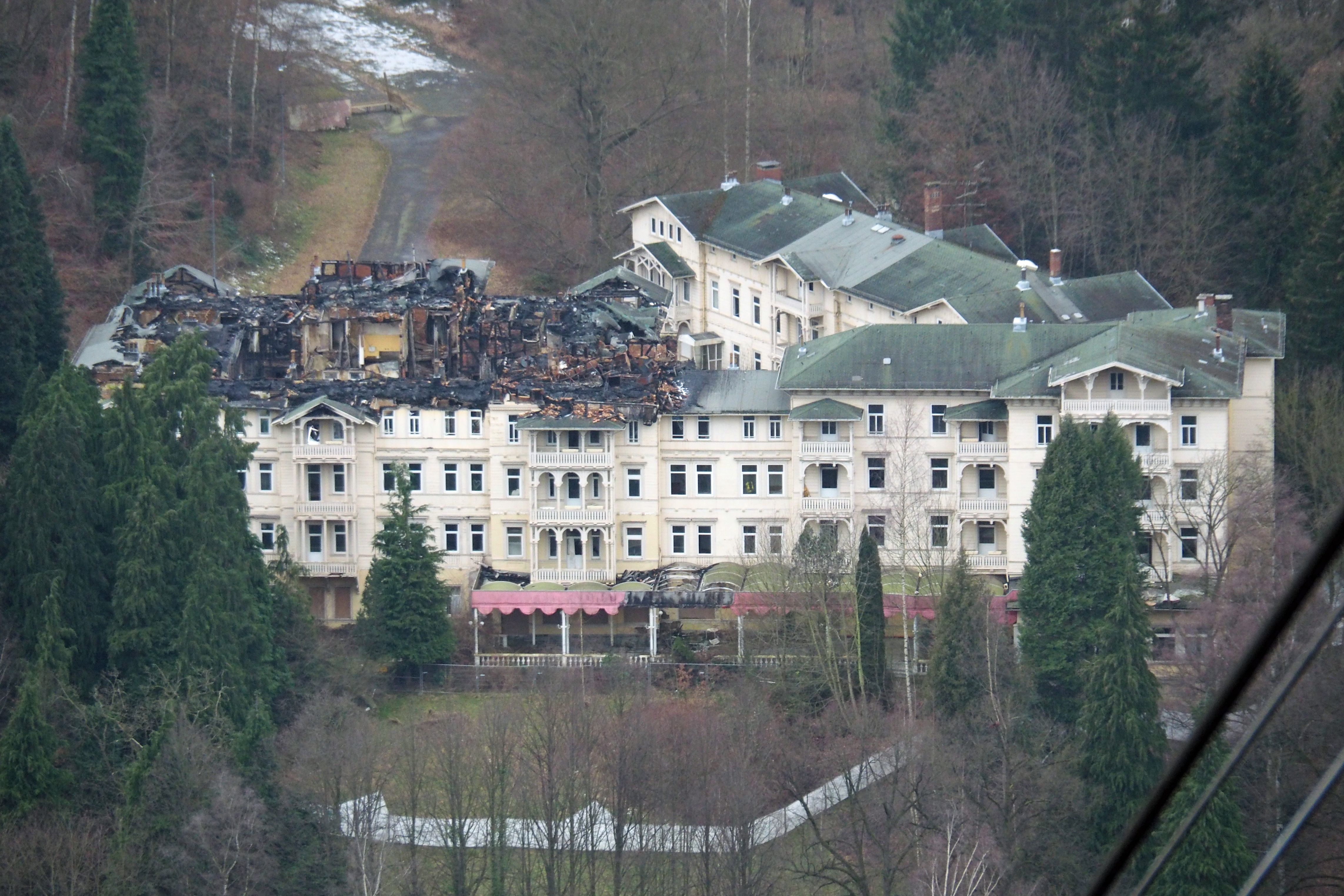 Ehemaliges Hotel „Harzburger Hof“, Bad Harzburg - nach dem Brand vom 21. Mai 2014